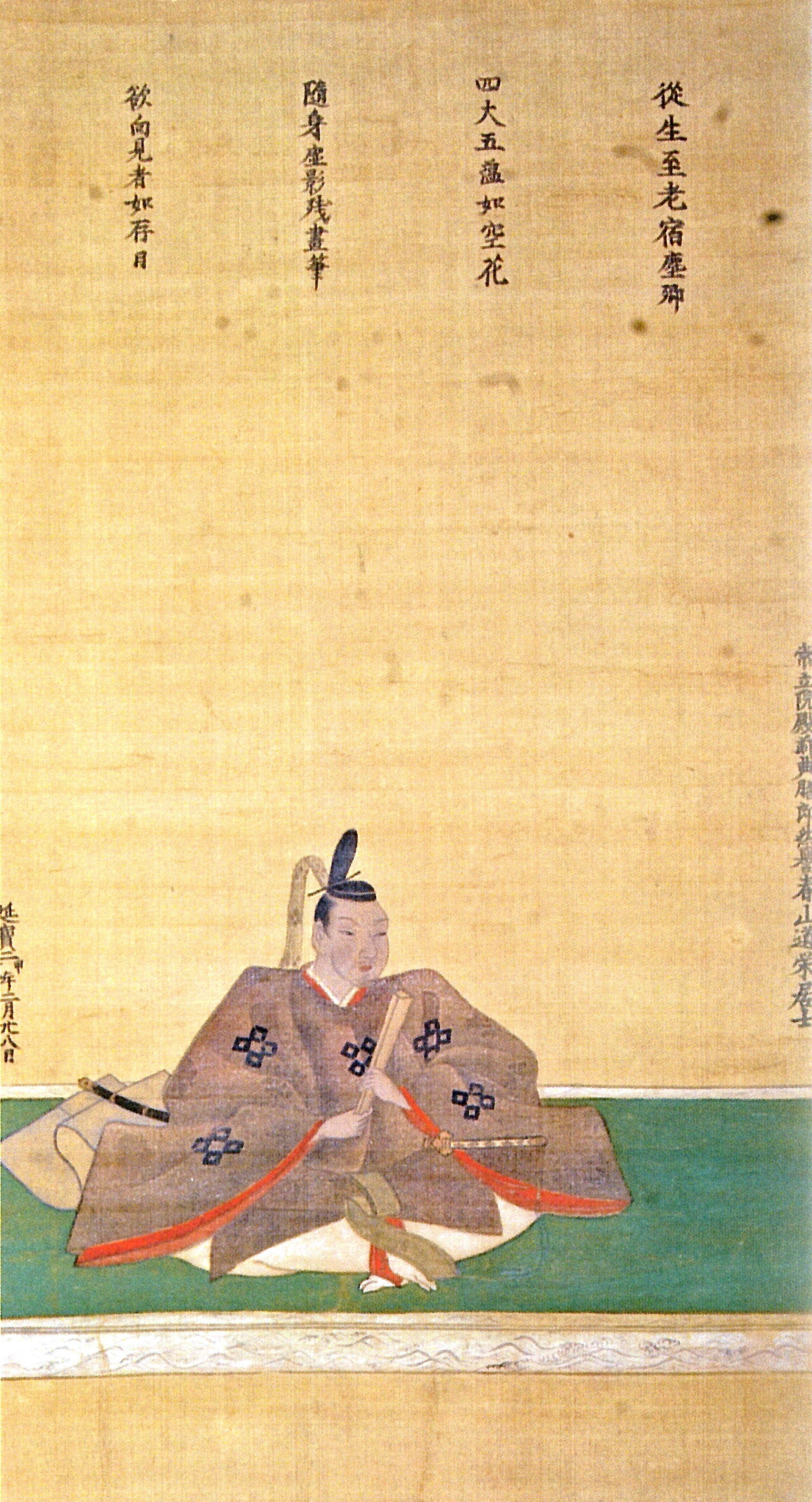 京極高供の肖像。